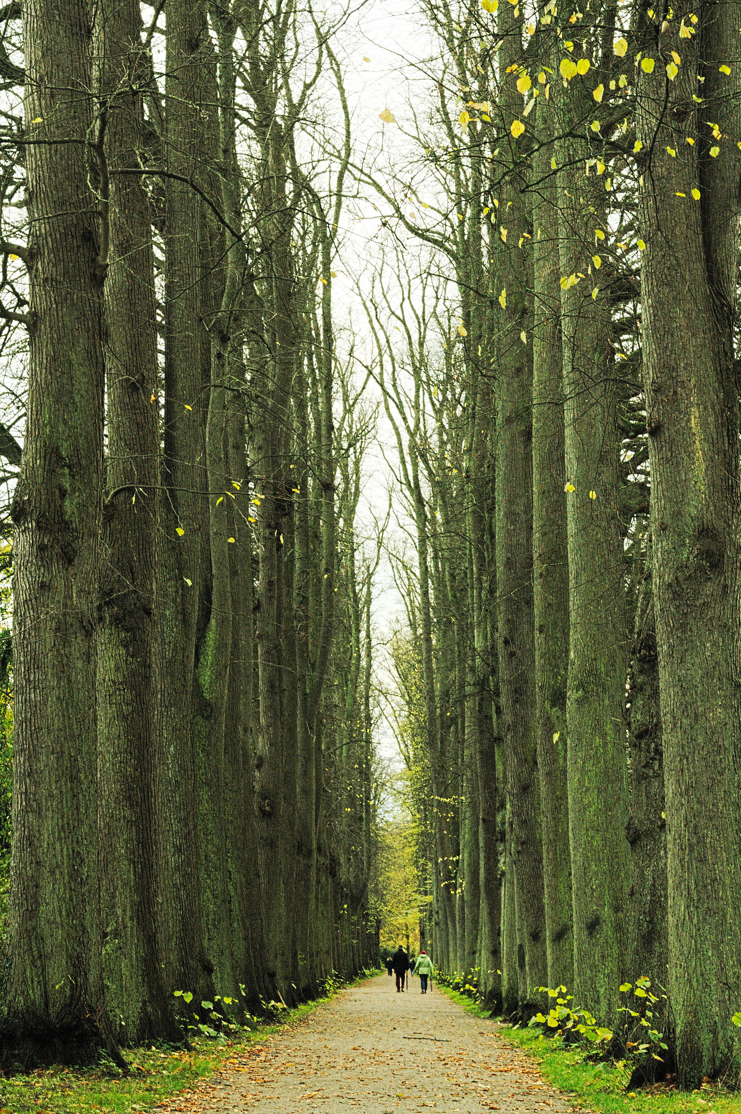 Blick auf die Allee im Schlosspark von Eutin neben dem Eutiner Schloss.